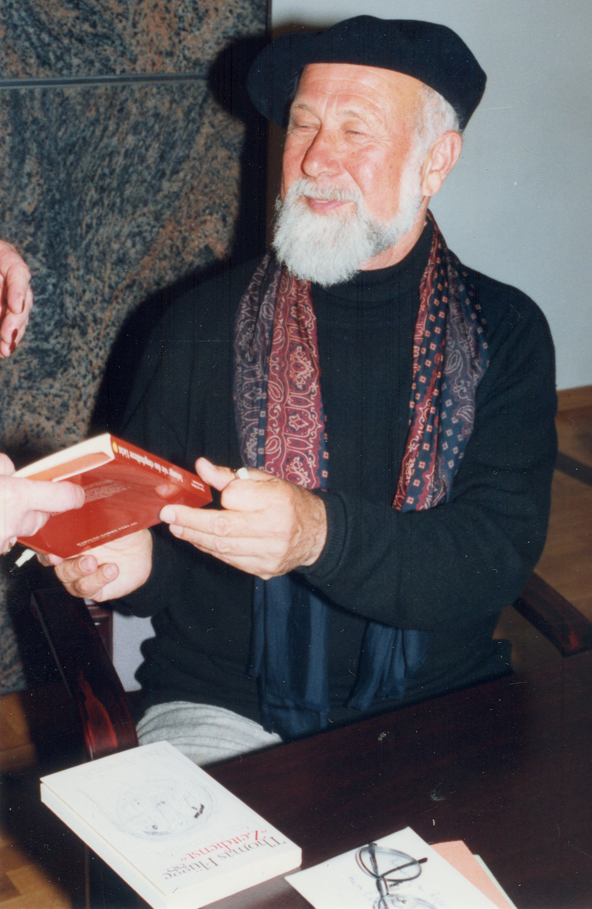 Impression während einer Lesung des israelischen Aphoristikers, Lyrikers und Rabbiners Elazar Benyoëtz am 19. Juni 1996 in Hannover ...